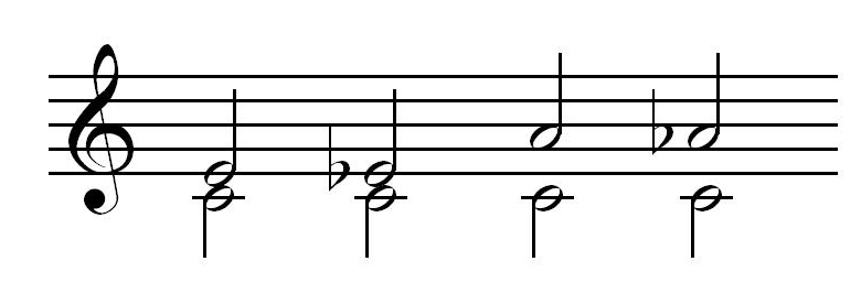 Srpskohrvatski / српскохрватски: Notni prikaz "nesavršenih konsonanci"